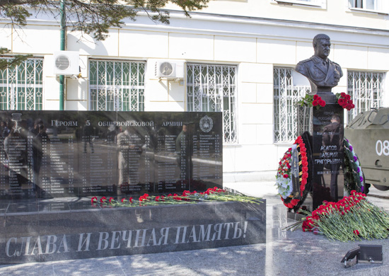 Суворовцы Уссурийского СВУ приняли участие в открытии памятника генерал-лейтенанту Валерию Асапову.